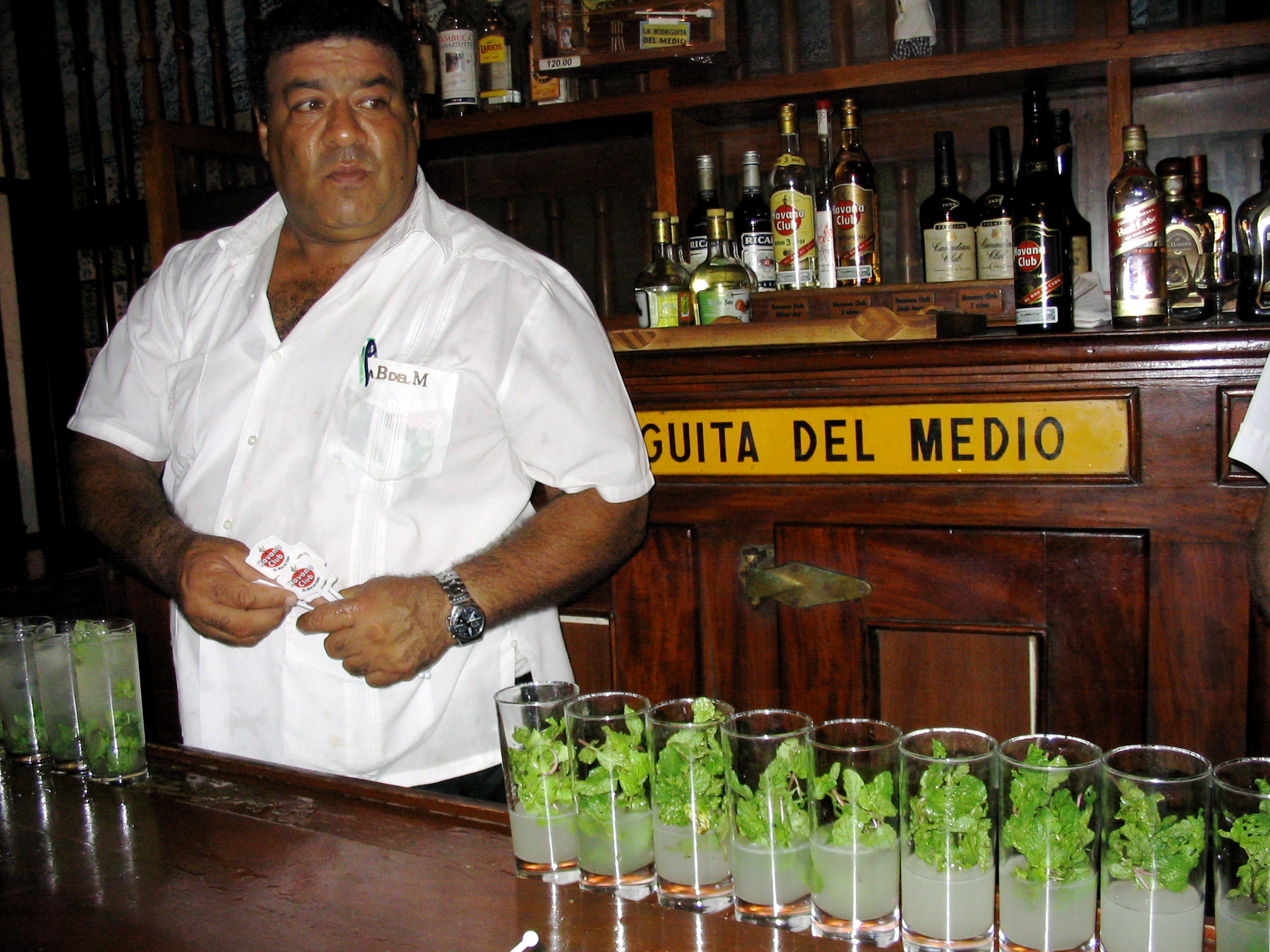 Bodeguita del Medio, Havana Vieja